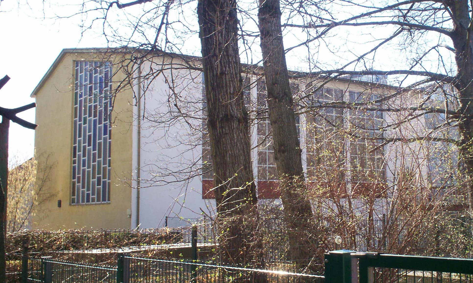 Augustanakirche (Berlin): Ansicht von Norden mit Nordost- und Nordwestfenster